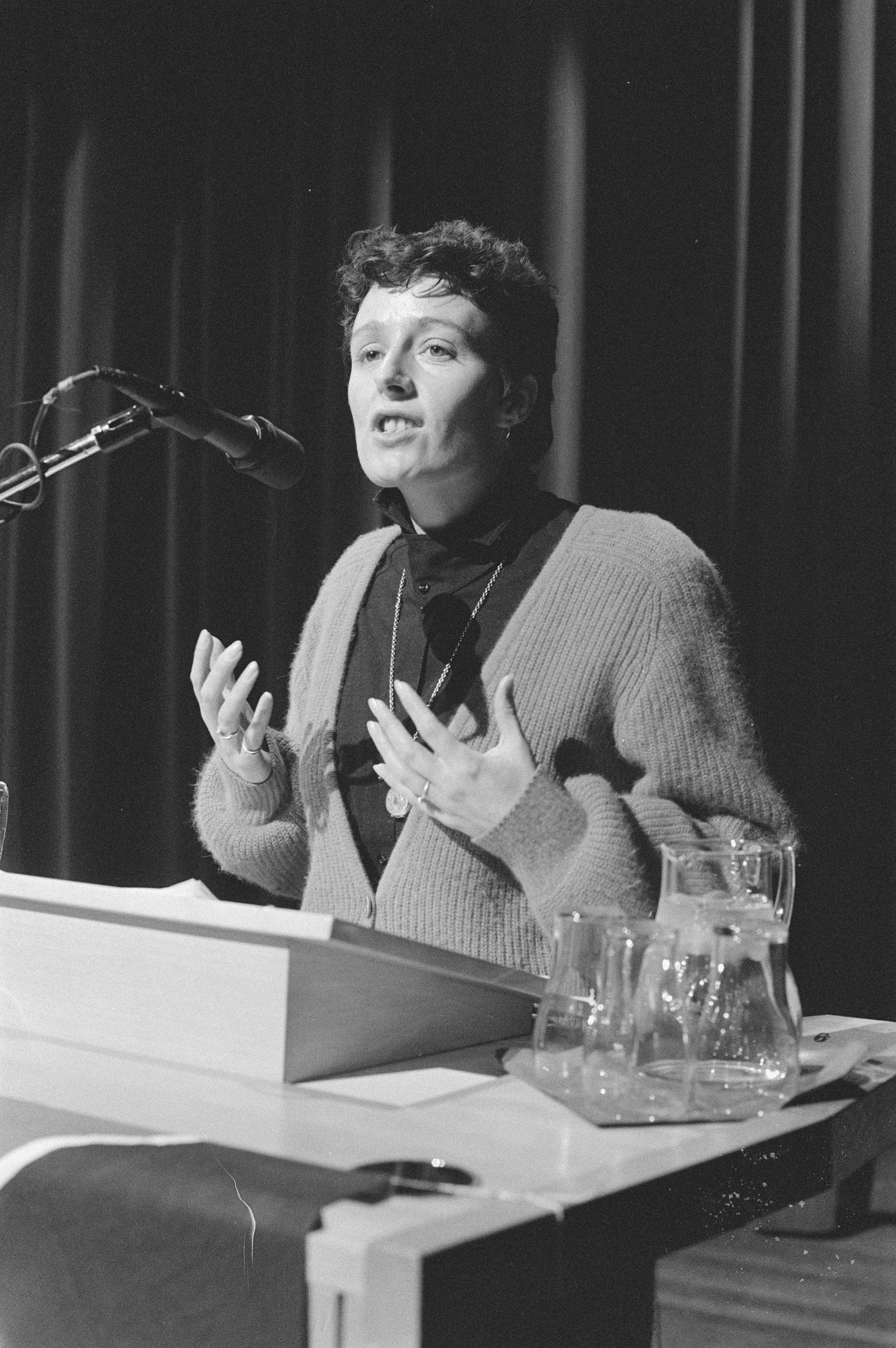 Collectie / Archief : Fotocollectie Anefo Reportage / Serie : [ onbekend ] Beschrijving : Landelijke CPN-manifestatie in de RAI in Amsterdam; Ina Brouwer tijdens haar toespraak Datum : 3 februari 1985 Locatie : Amsterdam, Noord-Holland Trefwoorden : manifestaties, toespraken Persoonsnaam : Ina Brouwer Instellingsnaam : RAI Fotograaf : Vollebregt, Sjakkelien / Anefo Auteursrechthebbende : Nationaal Archief Materiaalsoort : Negatief (zwart/wit) Nummer archiefinventaris : bekijk toegang 2.24.01.05 Bestanddeelnummer : 933-2240